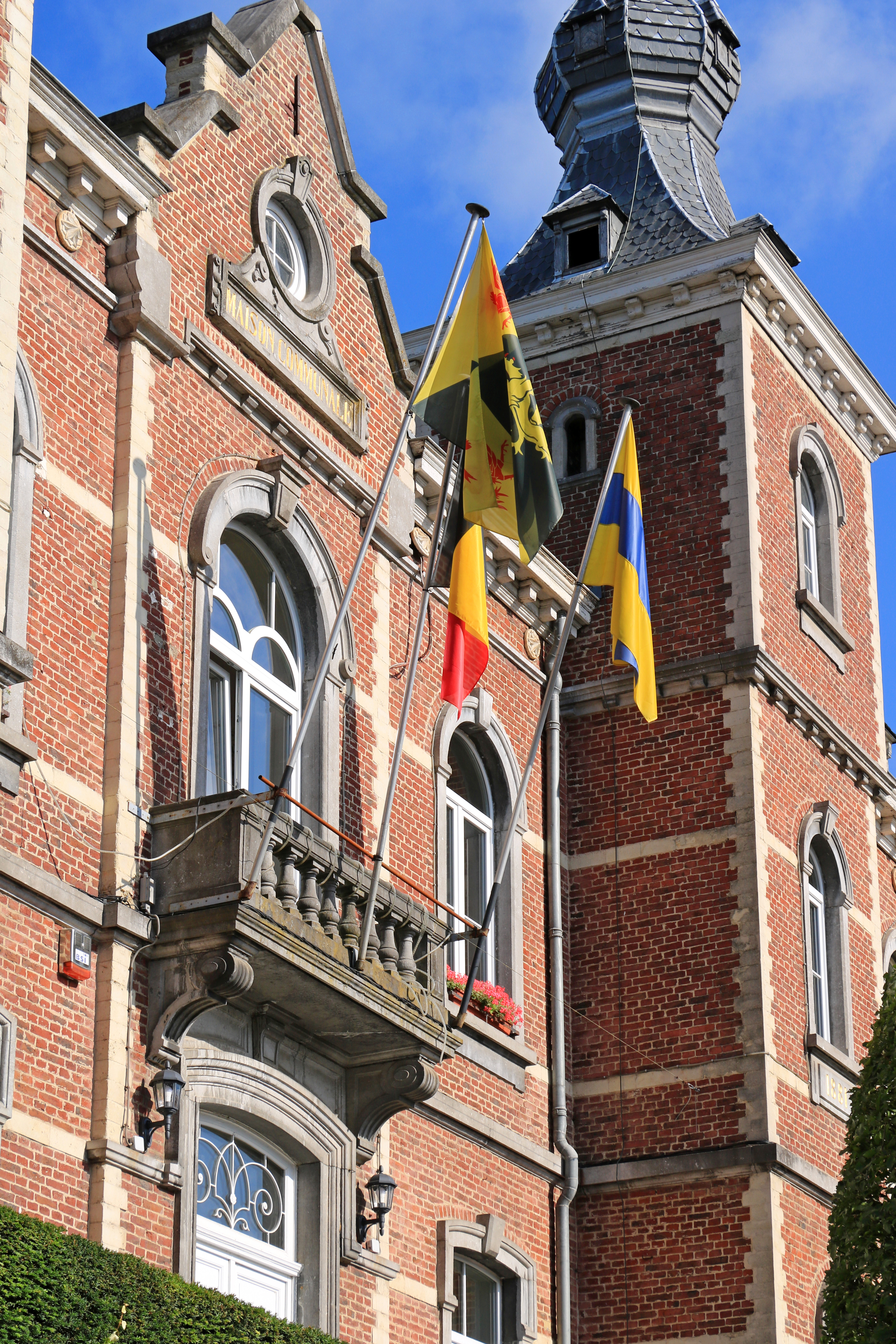 Belgique - Ottignies - maison communale (architecte Émile Coulon - 1881 - style éclectique)